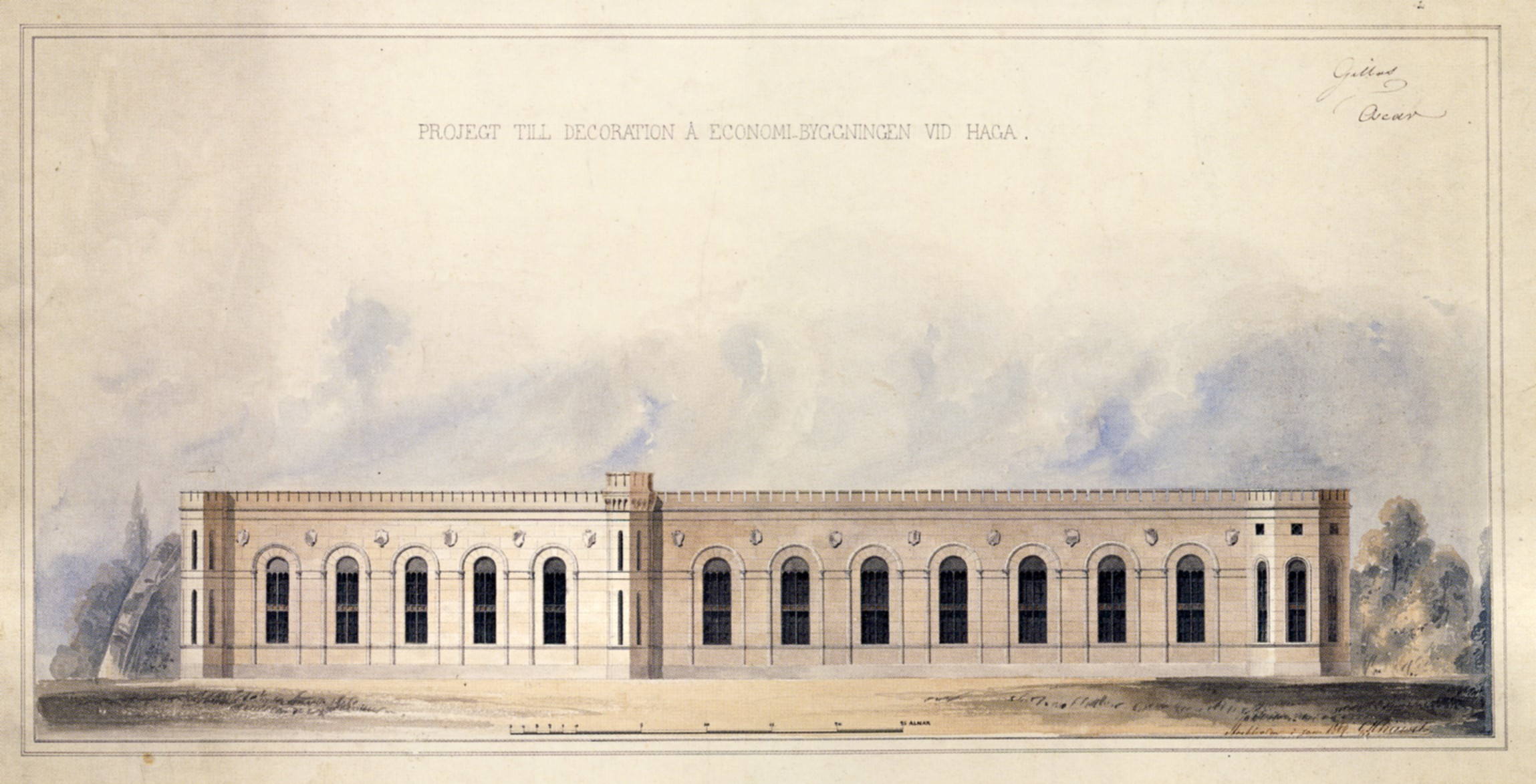 Fasadritning till Haga ekonomibyggnad, Hagaparken